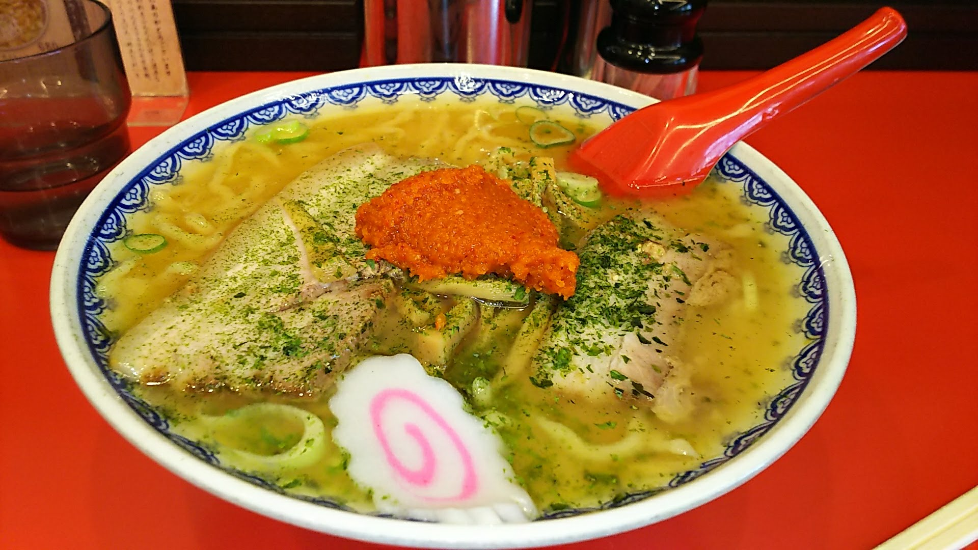 龍上海の赤湯辛味噌ラーメン（龍上海本店にて）